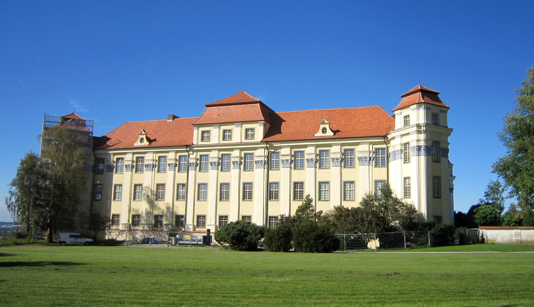 Neues Schloss Tettnang - Die Südostfassade nach Instandsetzung 2014